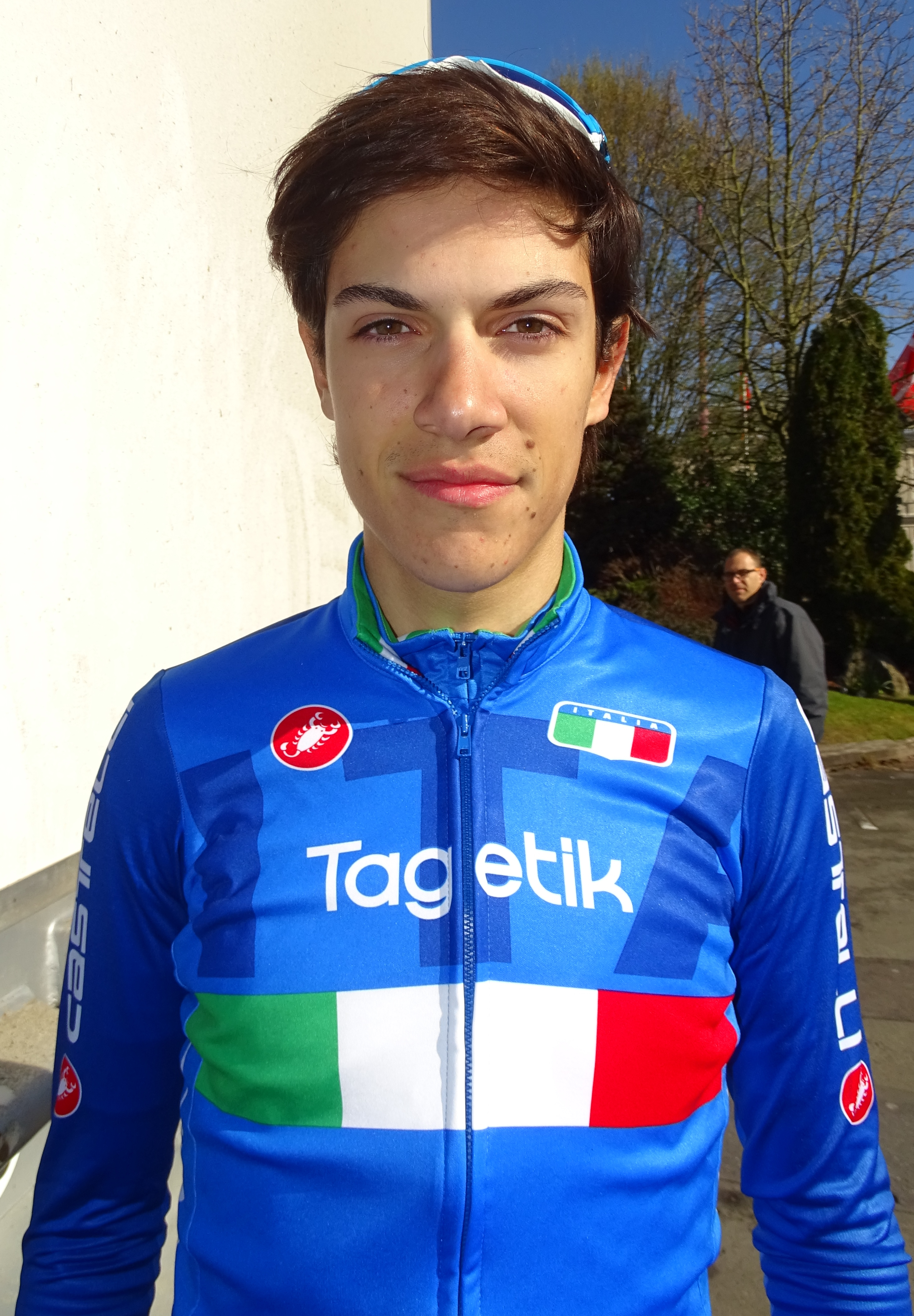 Reportage réalisé le dimanche 10 avril à l'occasion du départ du Paris-Roubaix juniors 2016 à Saint-Amand-les-Eaux, France.